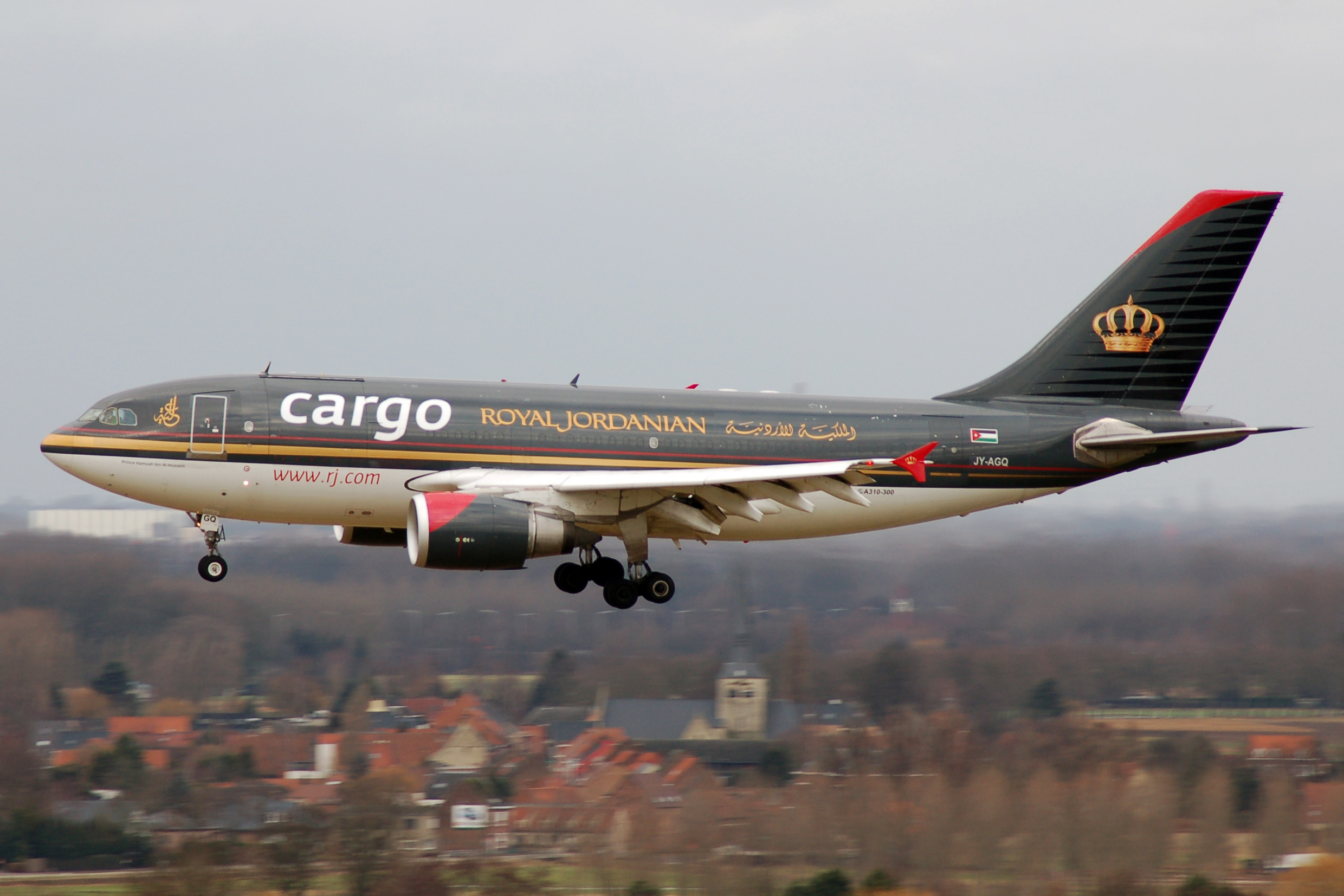 Airbus A310-300, Royal Jordanian, Brussels Airport